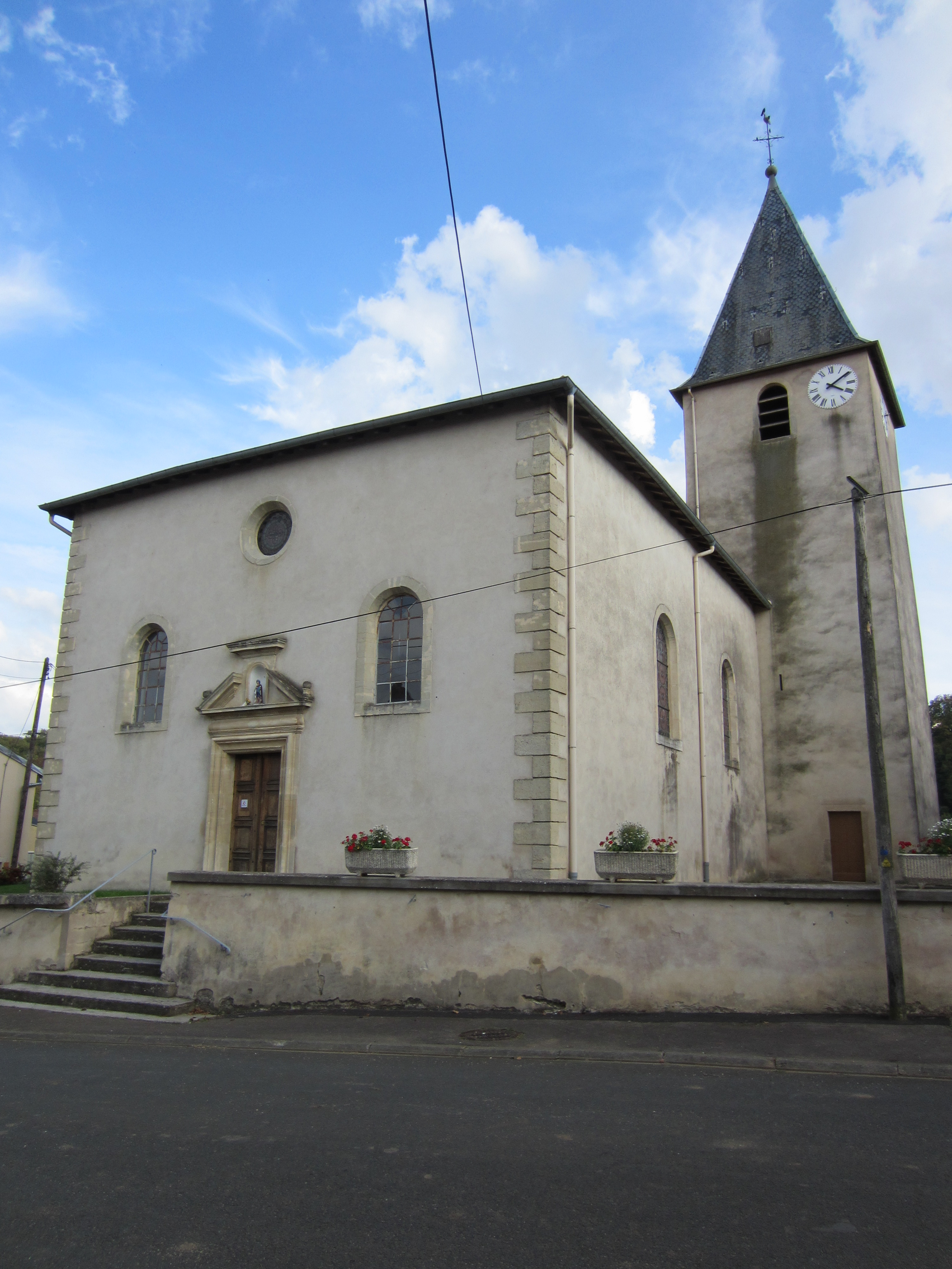 Description eglise Euvezin eglise Euvezin